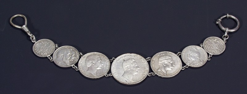 Charivari (Schmuckkette)